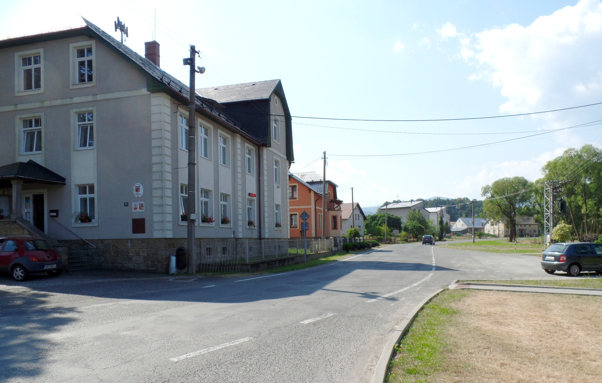 Stará Červená Voda - centrum, pierwszy budynek to urząd gminy